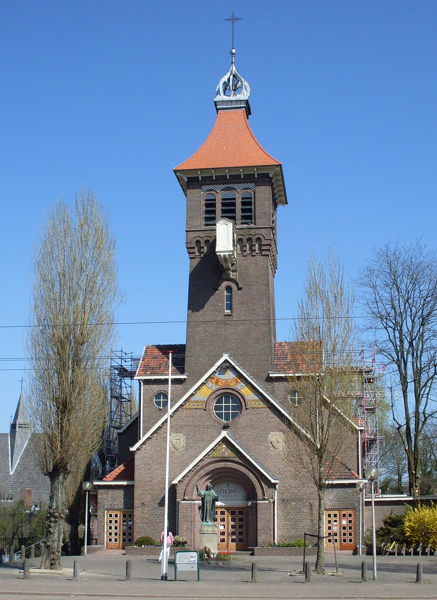 Sint Petrusbandenkerk Diemen.